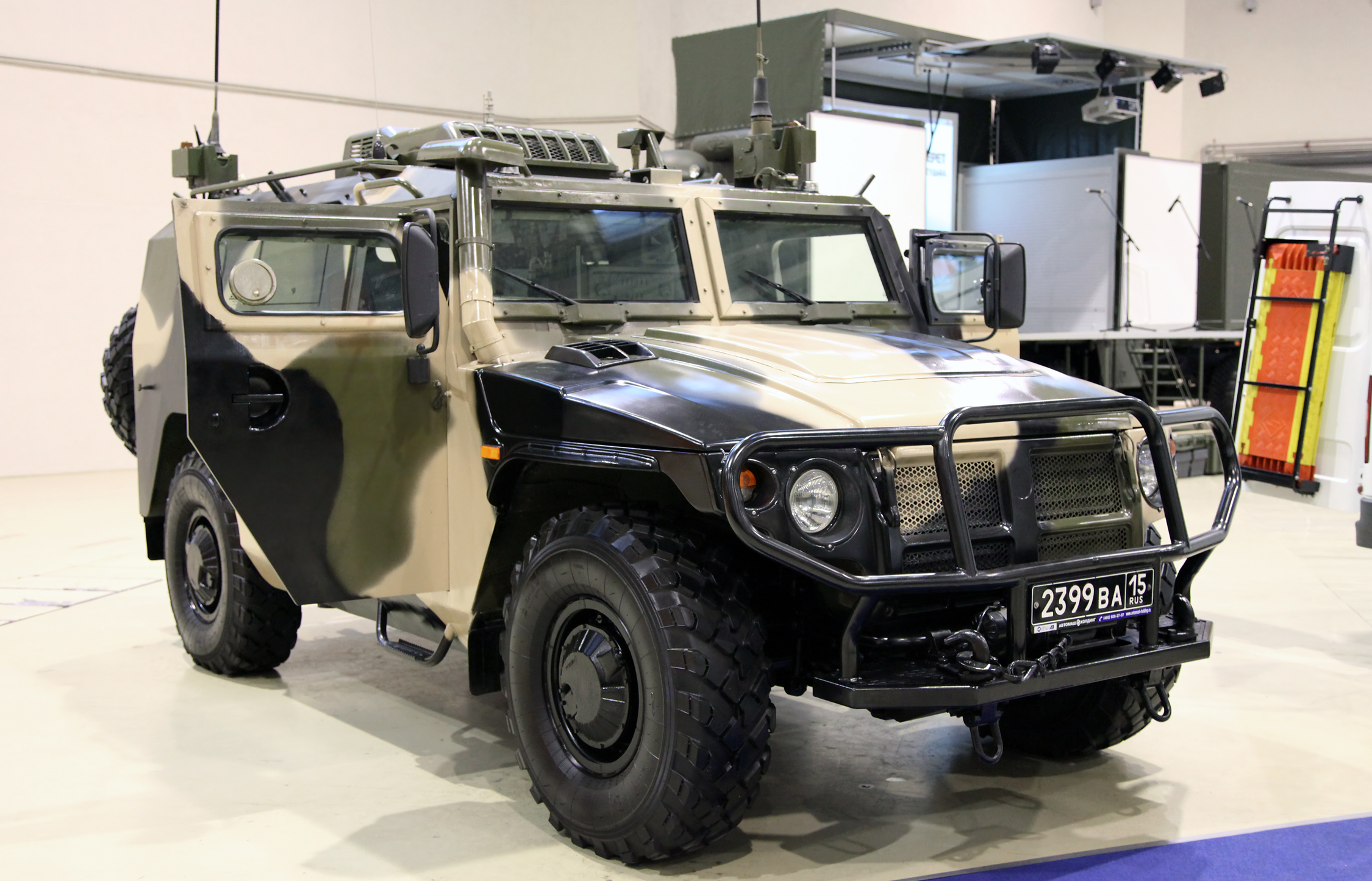 Командно-штабная машина Р-145БМА (Command vehicle R-145BMA)